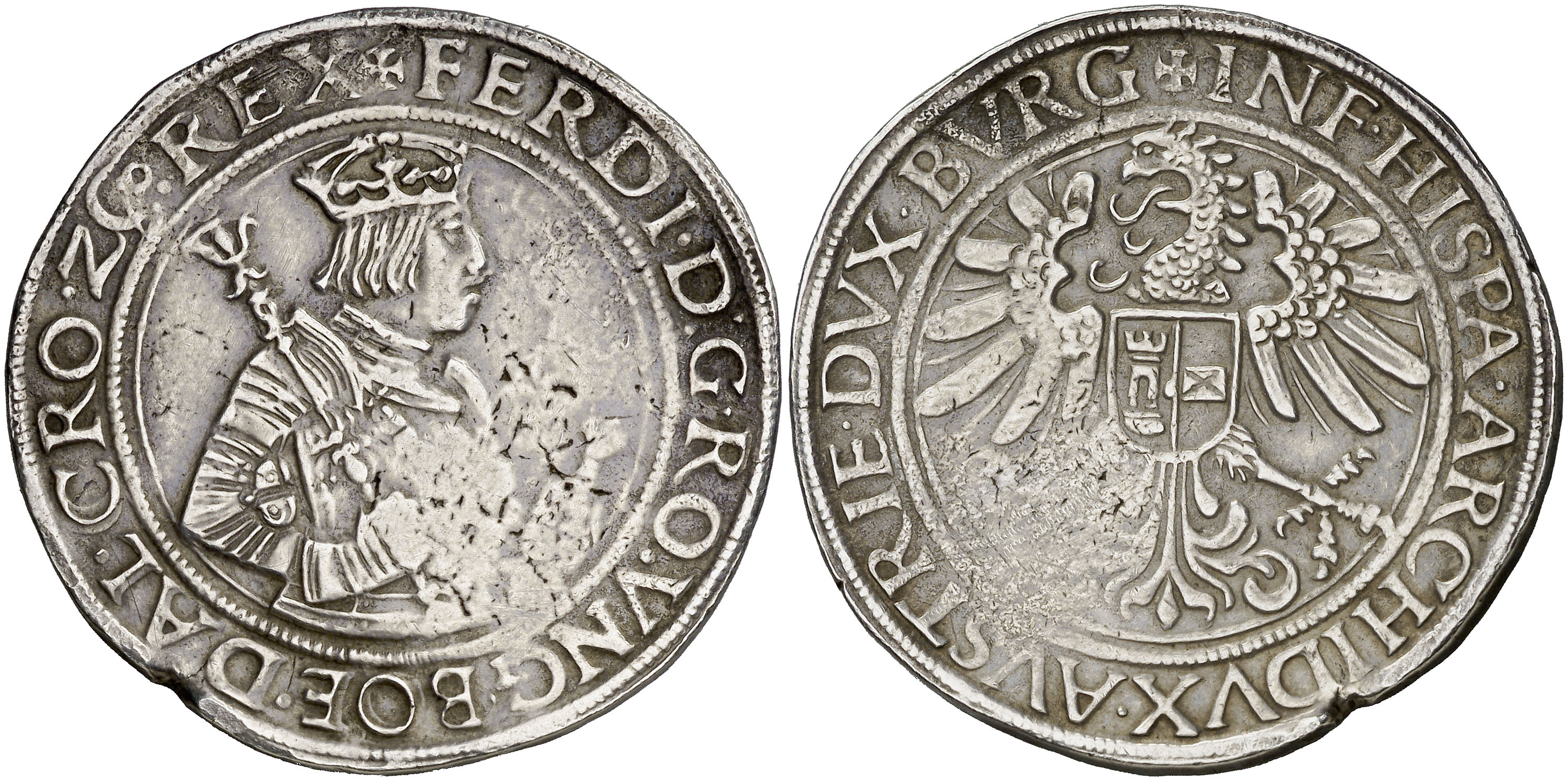 1 Taler de Fernando de Hungría y Bohemía, Infante de España